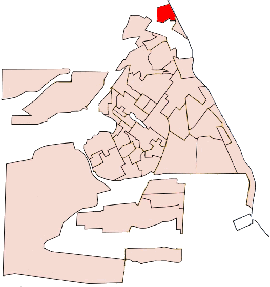 Barrio Altos del Golfo